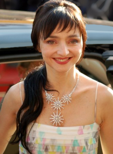 Maria de Medeiros au festival de Cannes.